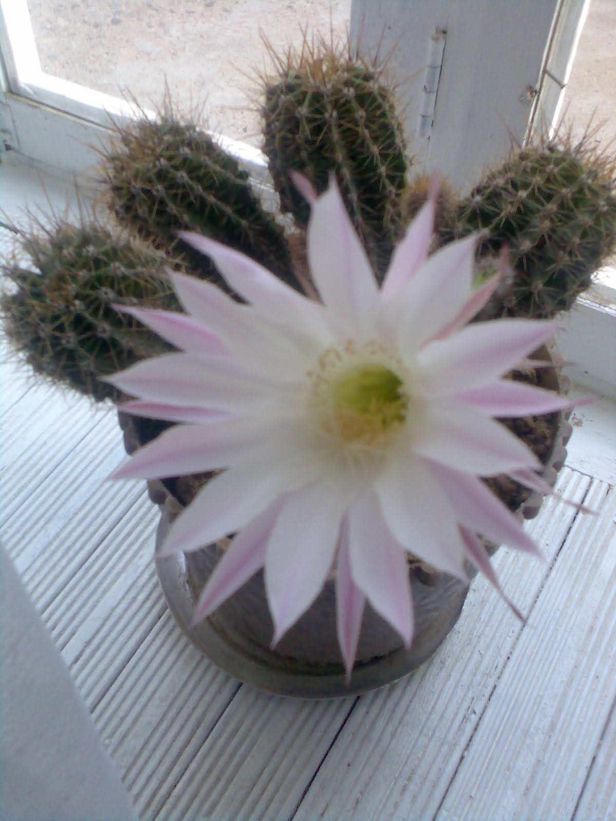 Kaktus